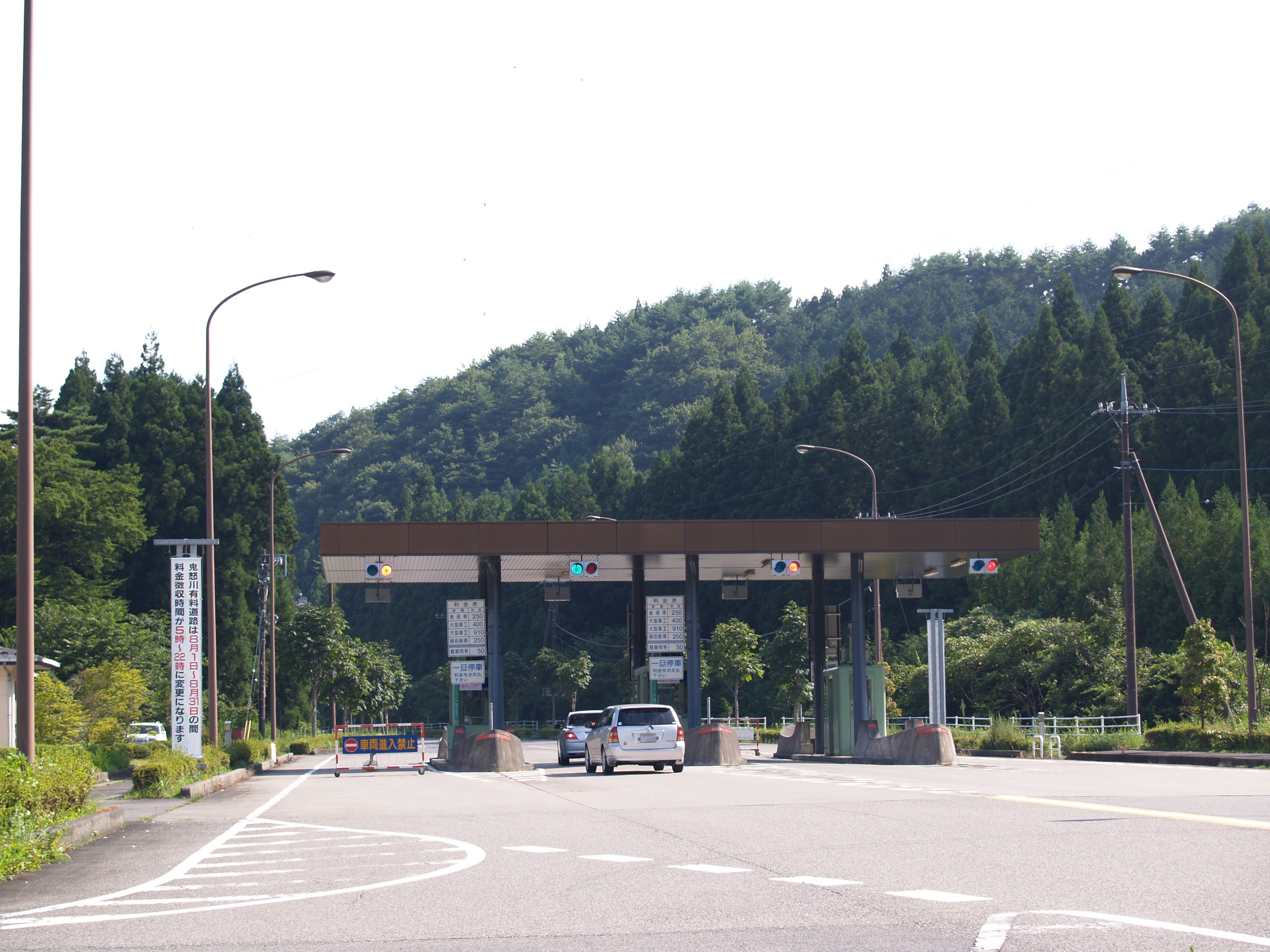 鬼怒川有料道路料金所